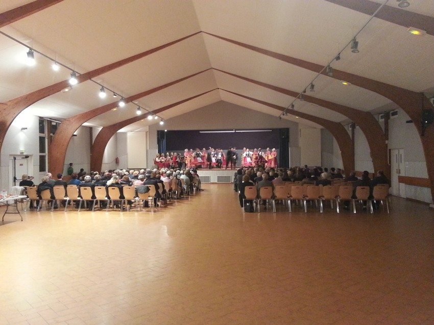 L'intérieur de la salle des fêtes de Noidans-lès-Vesoul